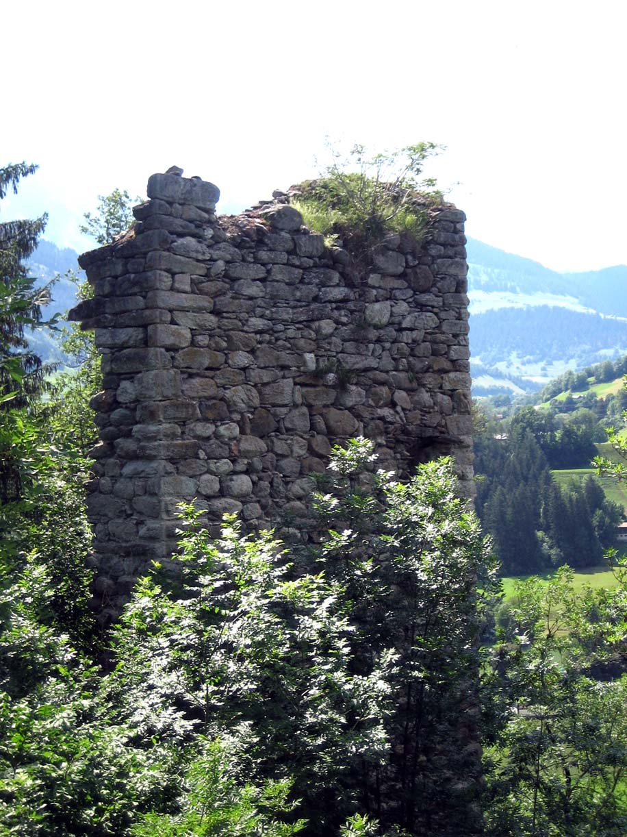 Fenster und Zugang zum Aborterker